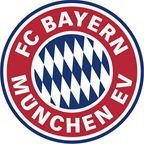 Logo Bayernu w latach 1996-2002